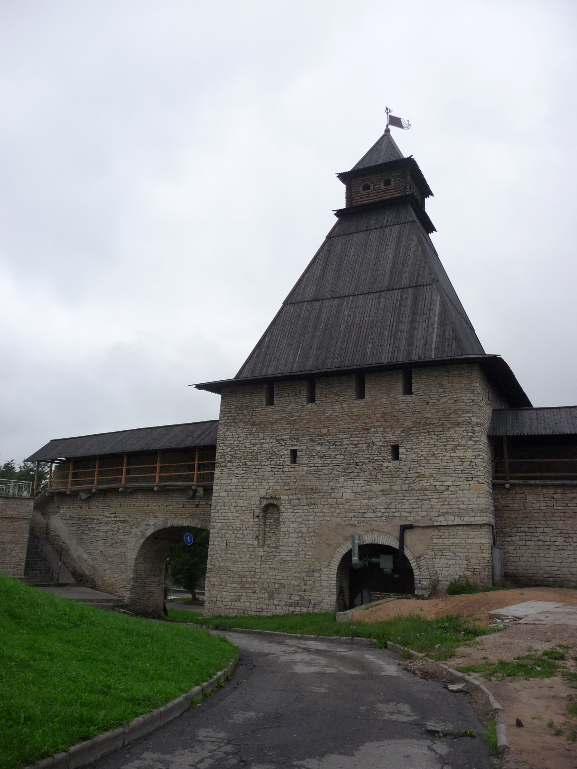 Власьевская башня - вид из Кремля